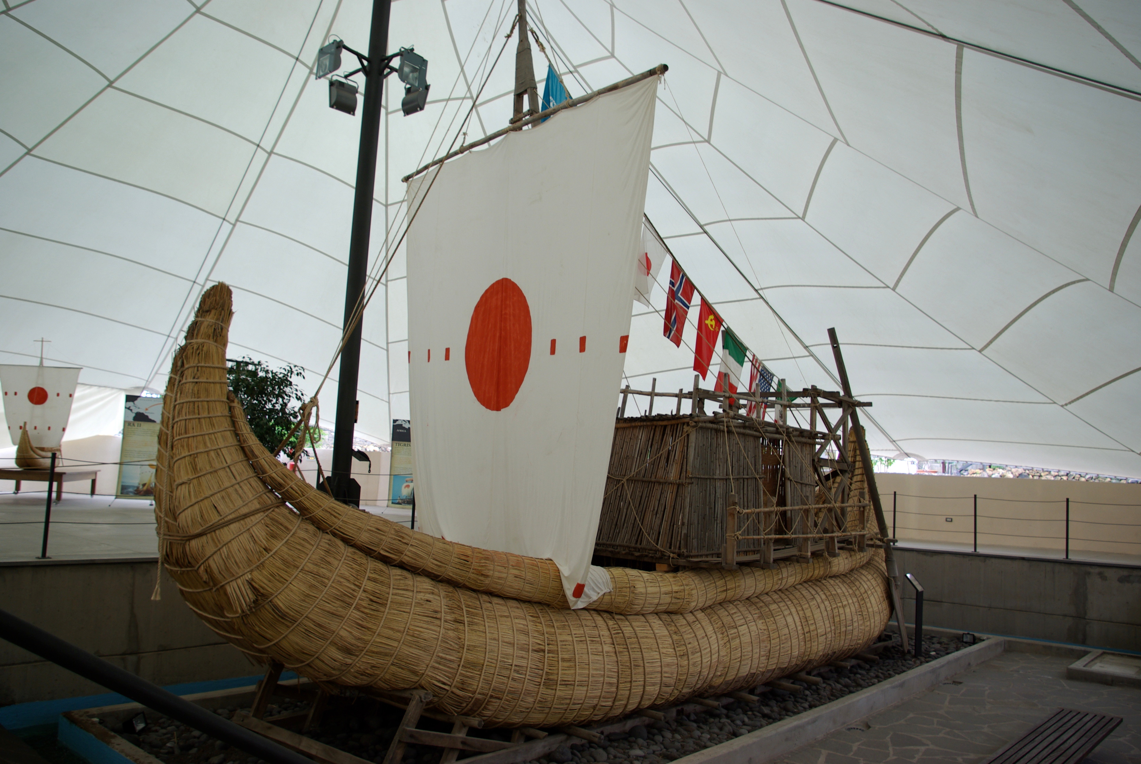 Schilfboot Ra II Nachbau in Güímar, Teneriffa